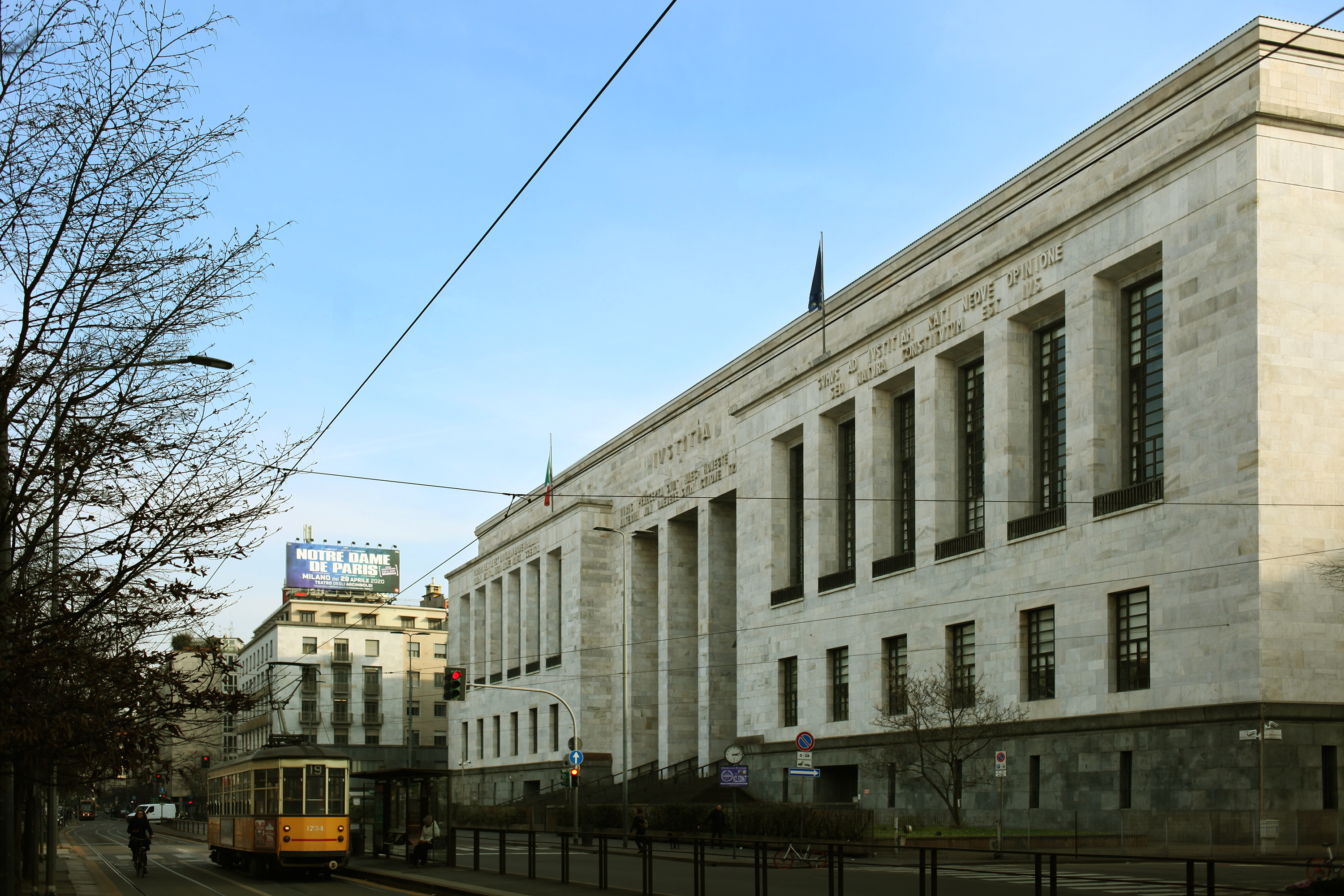 Il Palazzo di Giustizia di Milano, sede del Tribunale, opera di Marcello Piacentini (1932-1940)